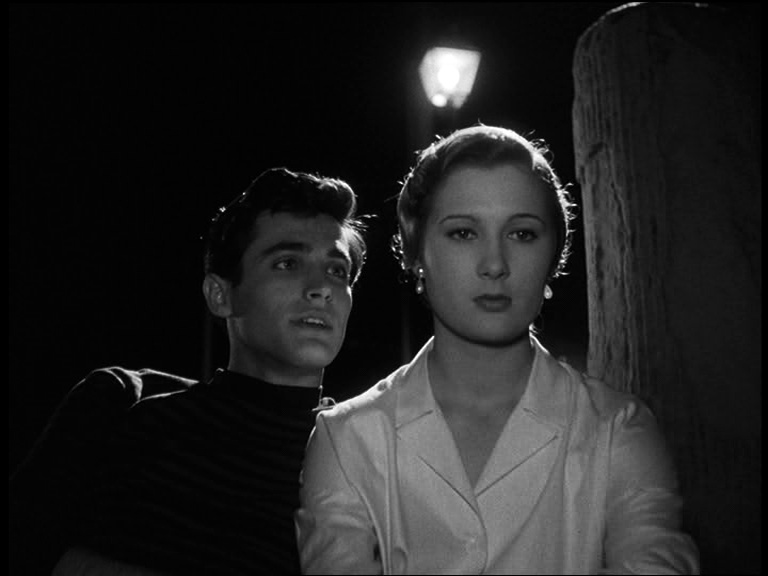 Screenshot del film Cronache di poveri amanti (1954) di Carlo Lizzani.